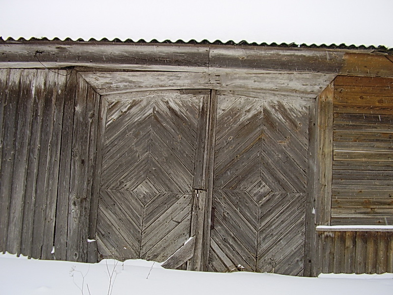 Нача. Карчма